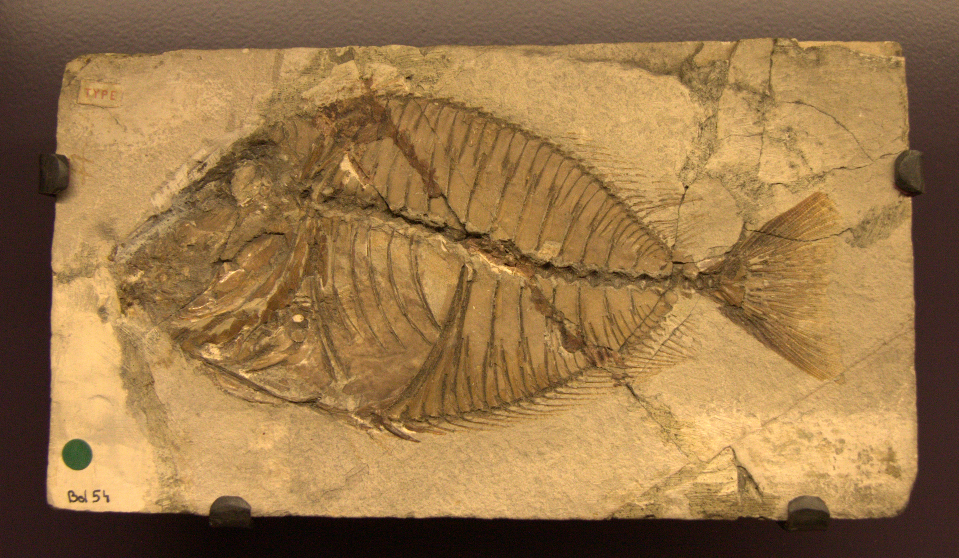 Daté d'environ 50 millions d'années, ce fossile est l'ancêtre du poisson chirurgien. Il a été découvert à Mote Bolca en Italie. The making of this document was supported by Wikimédia France. (Submit your project!)